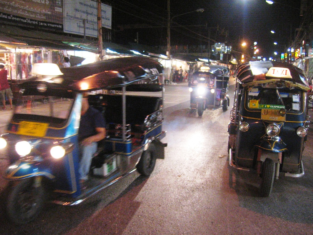 Tuk-tuk, Chiang Mai, Thailand.